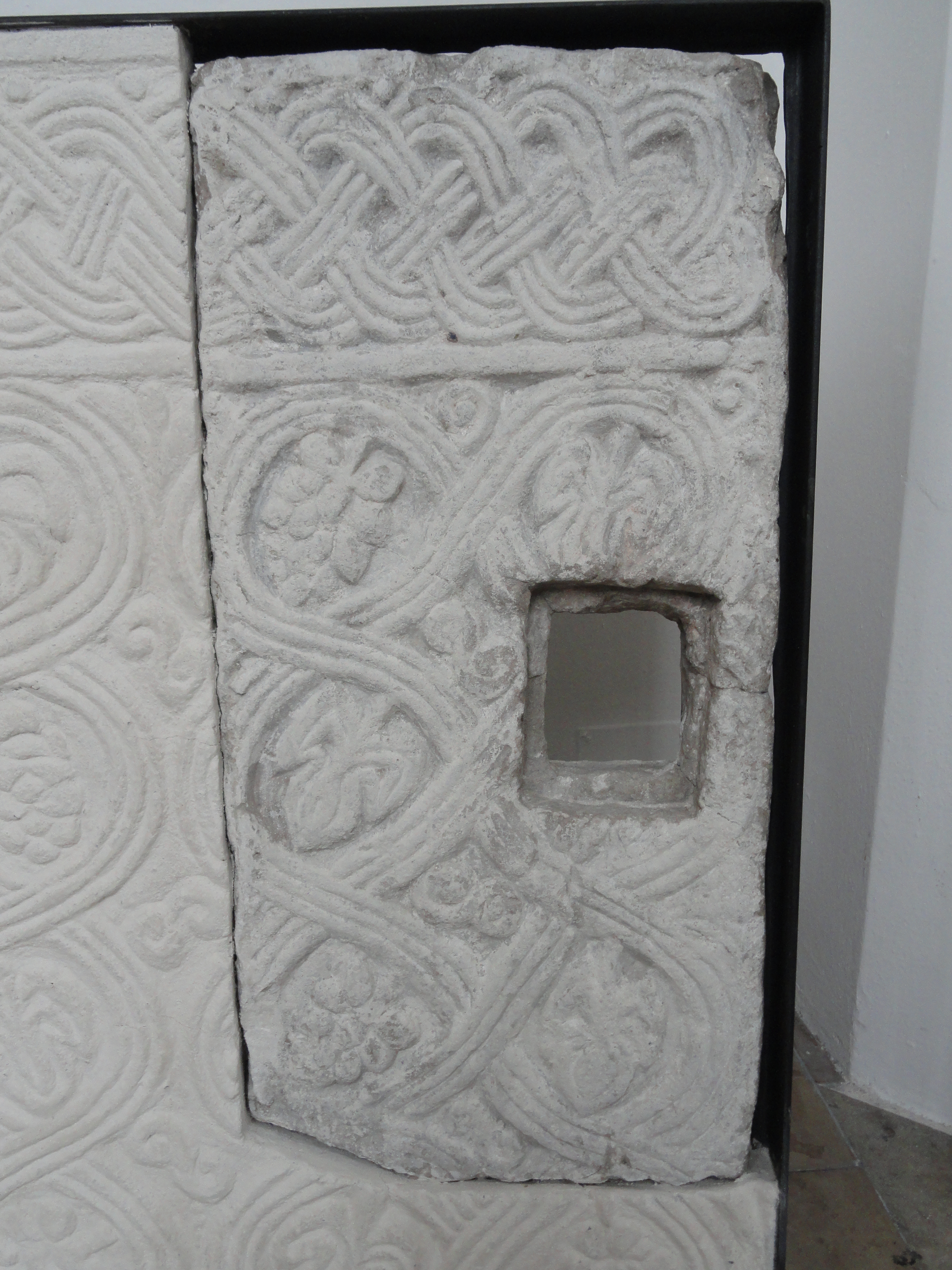 Flechtwerkstein